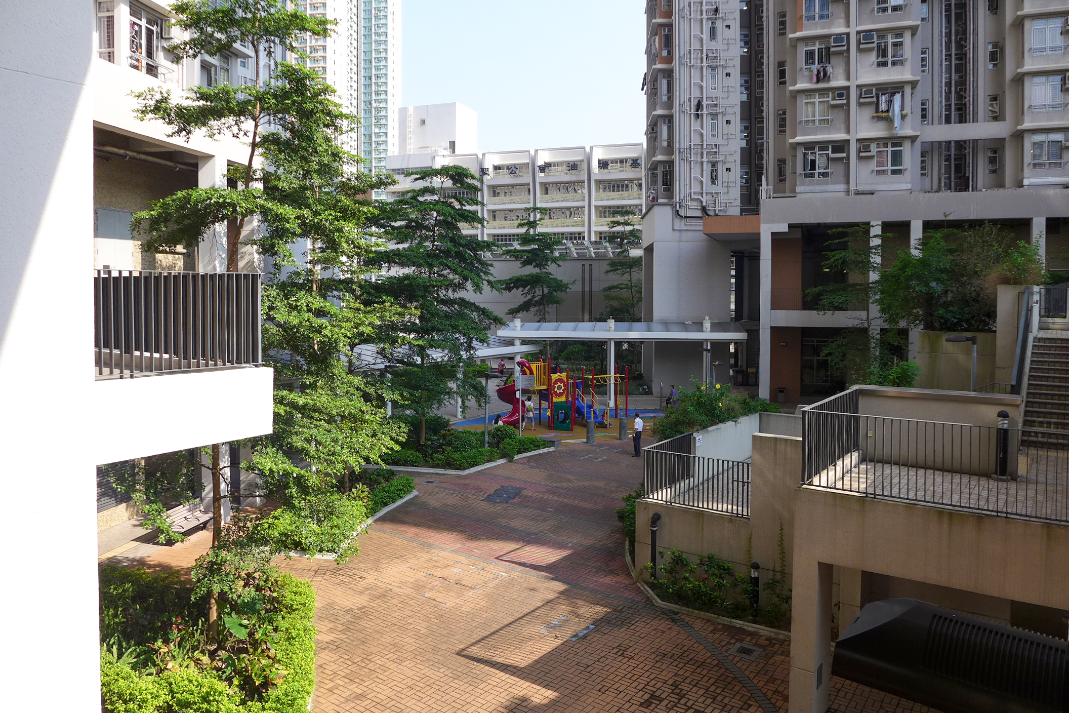 Yau Lai Estate Phase 5 Garden